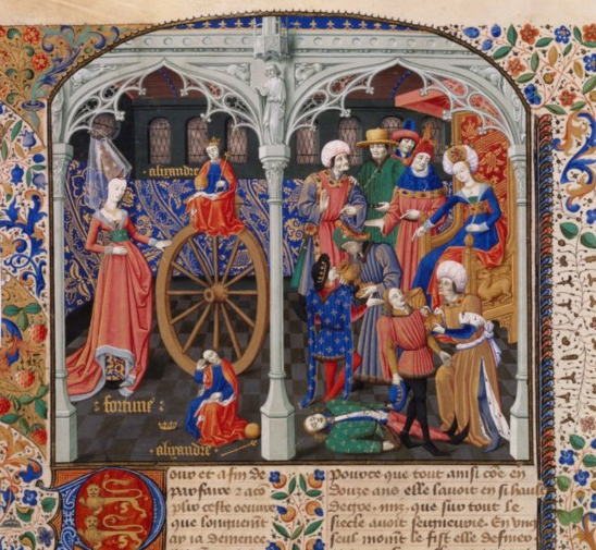 Bouquechardière BnF 2685 Fol. 280v - Roue de la Fortune et assassinat d'Alexandre II de Macédoine (détail)